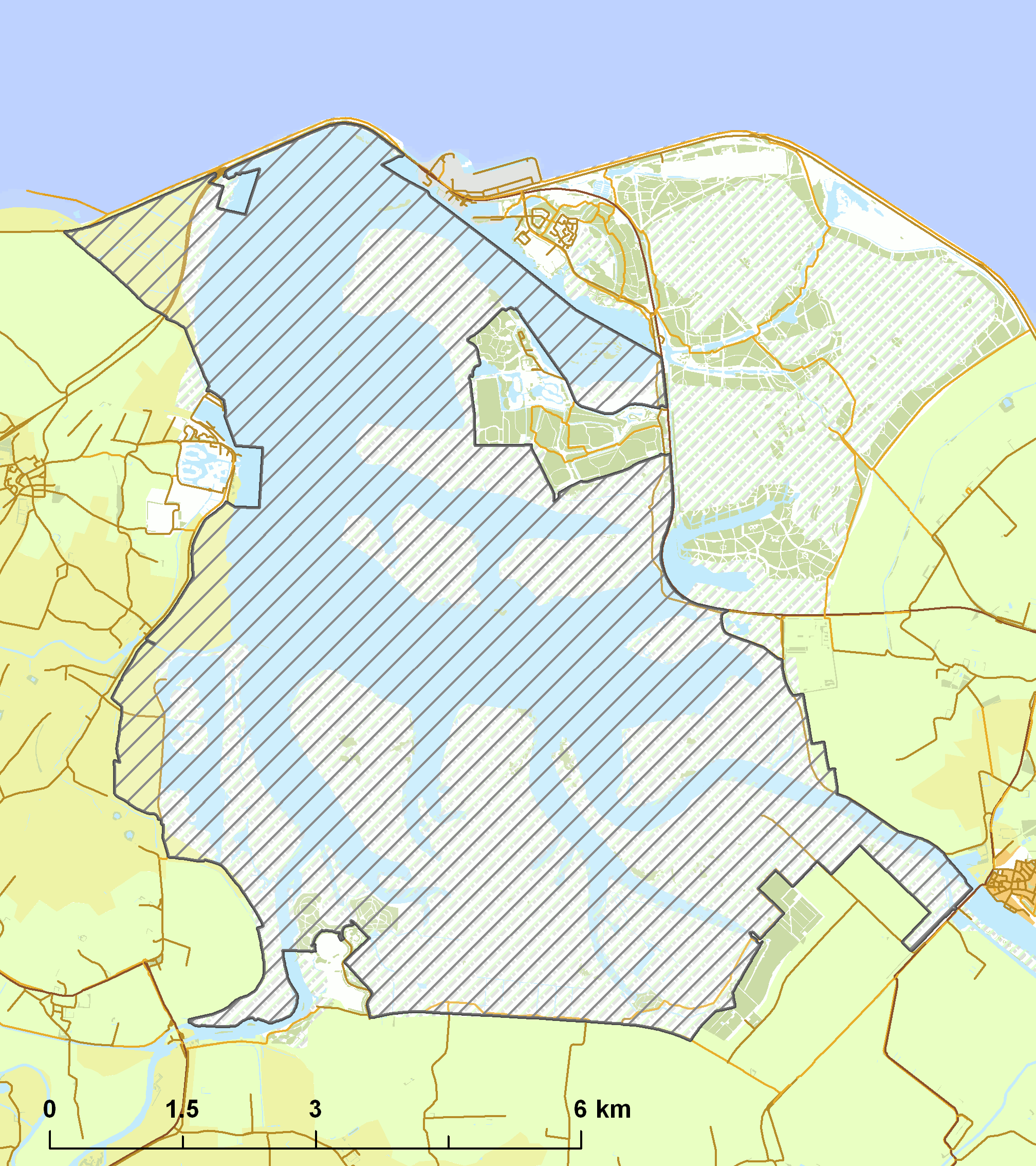 Natura2000 - Lauwersmeer.png